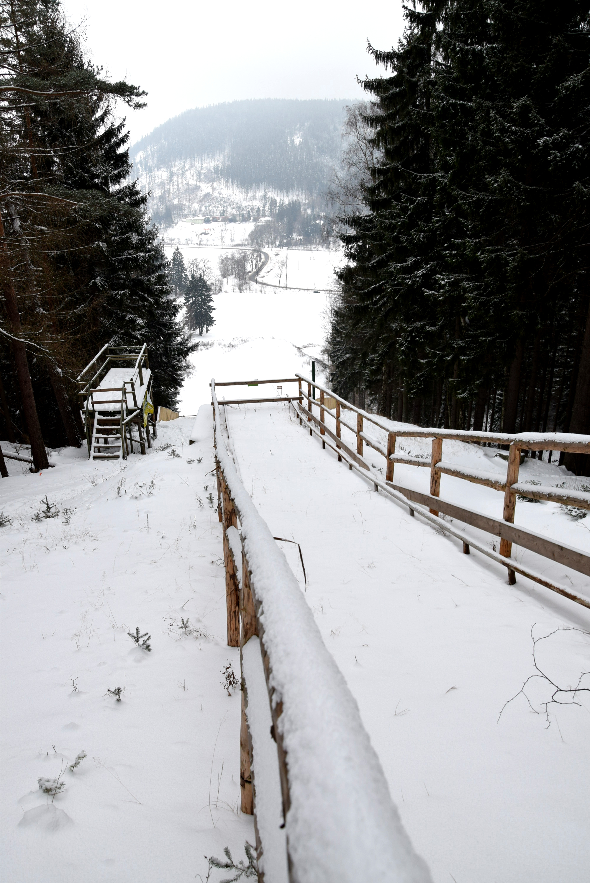 Zdjęcie przedstawia rozbieg skoczni narciarskiej na Kruczej Skale.